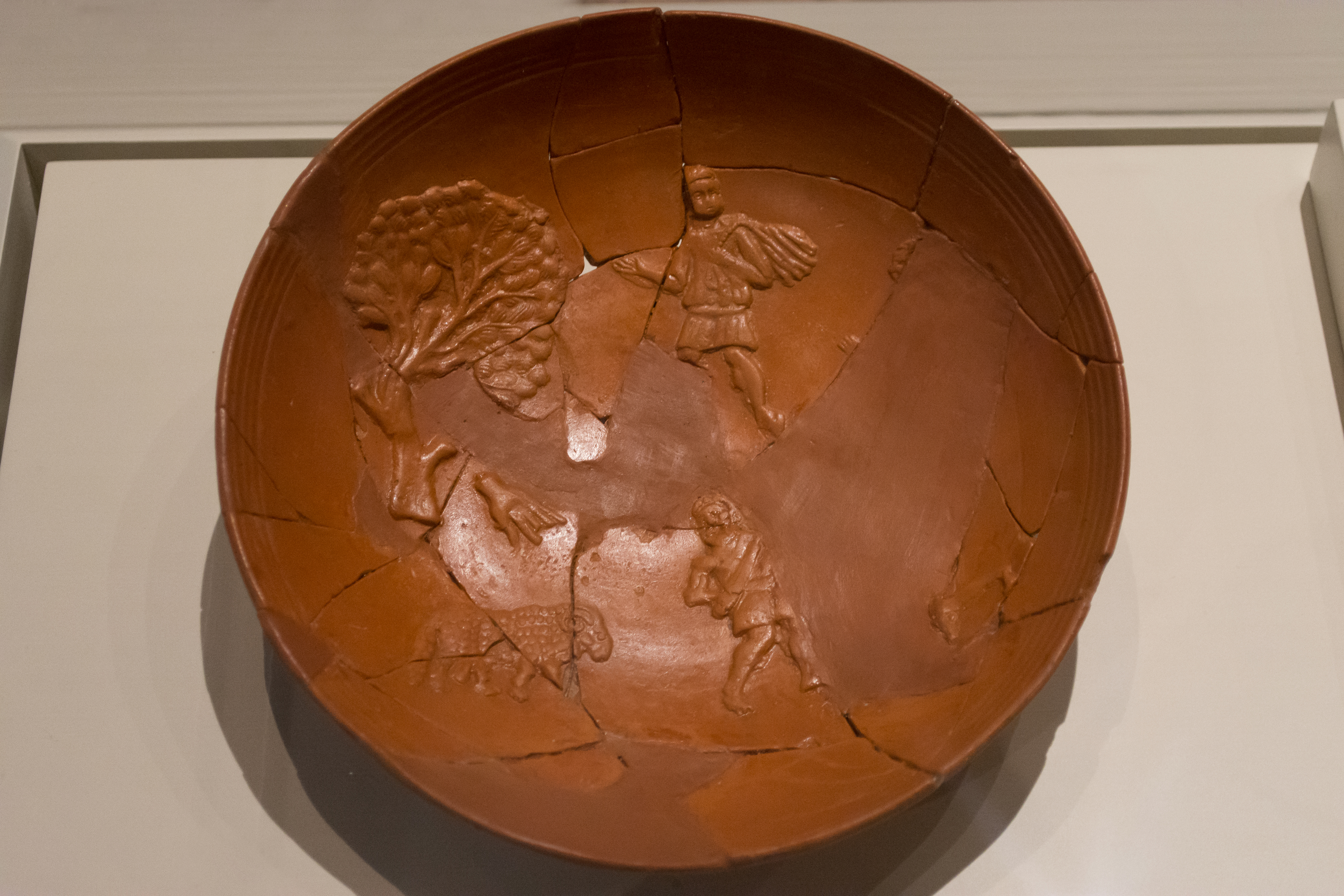 Plato con representación del sacrifico de Isaac. Terra sigillata africana. Siglo IV-inicios del siglo V. Procedencia: Rúa Marqués de Valladares (Vigo). Exposición Galaicos en el Museo de Prehistoria de Valencia. Conservado en el Museo Quiñones de León (Vigo).